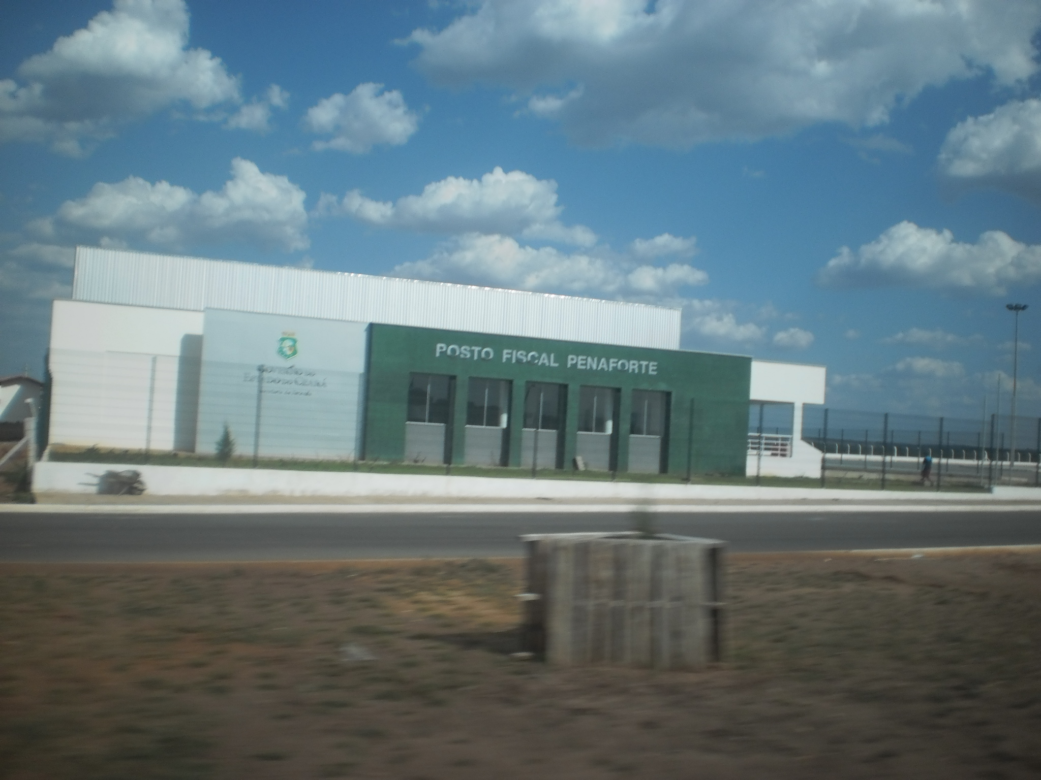 Novo posto fical de Penaforte, Ceará, Brasil.